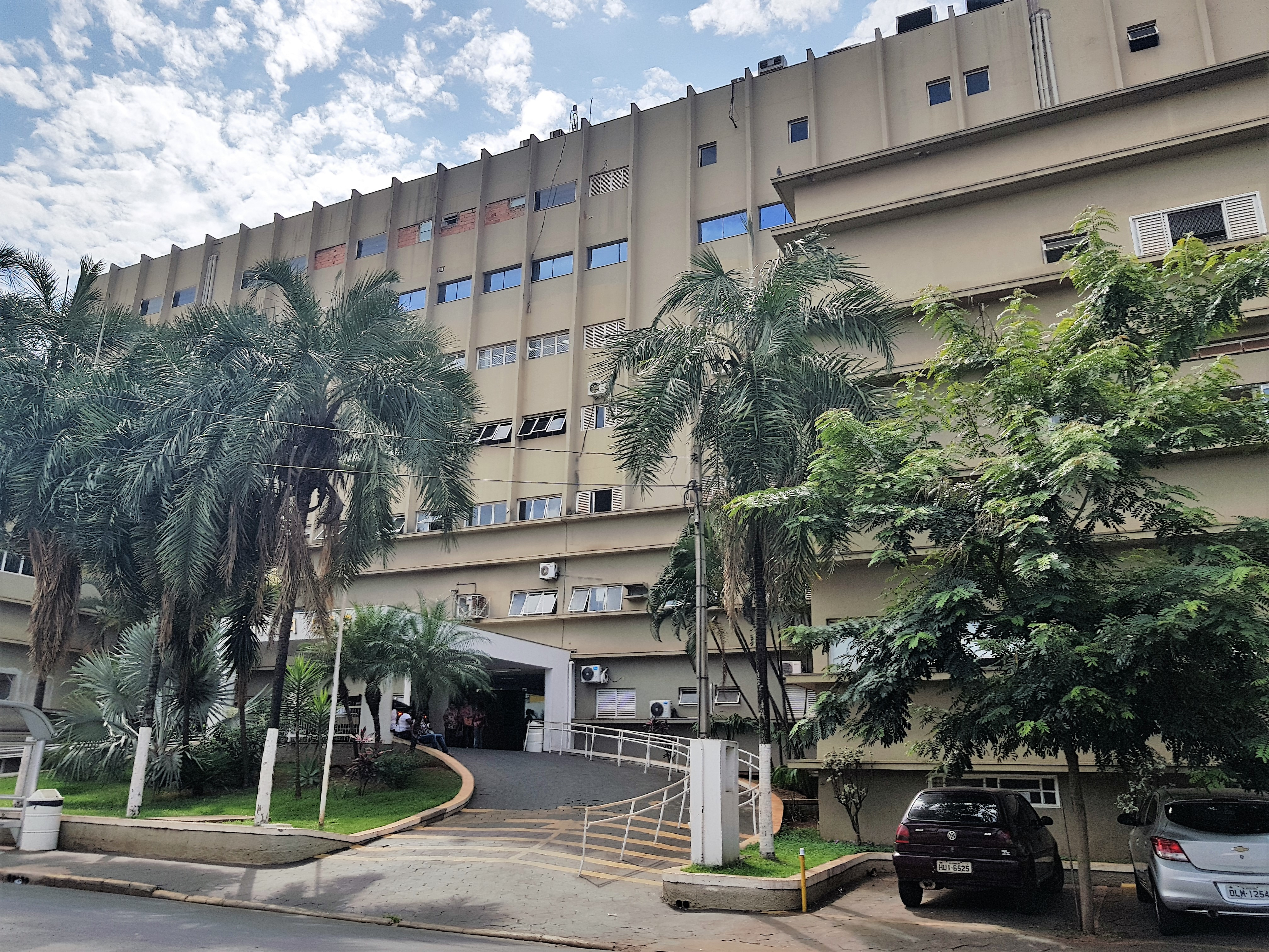 Vista frontal da Santa Casa de Misericórdia de Barretos